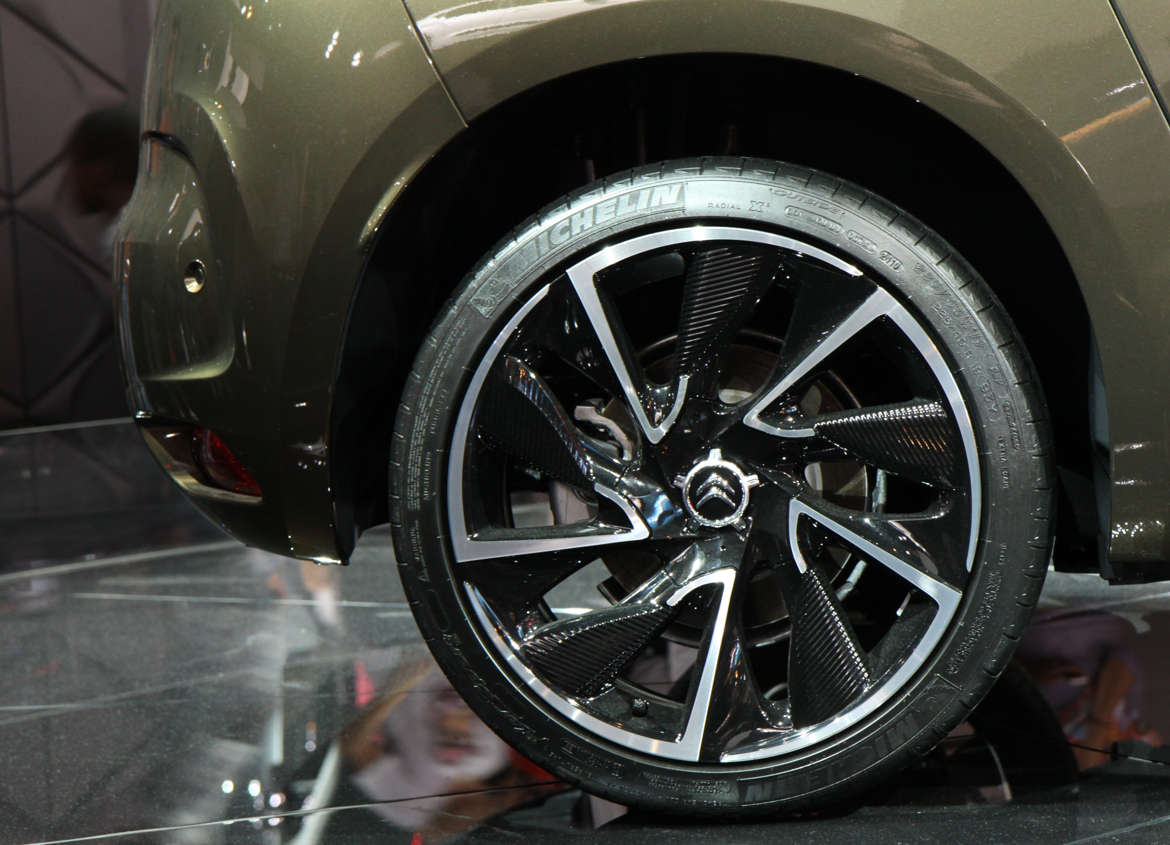 Paris - Mondial de l'automobile 2010